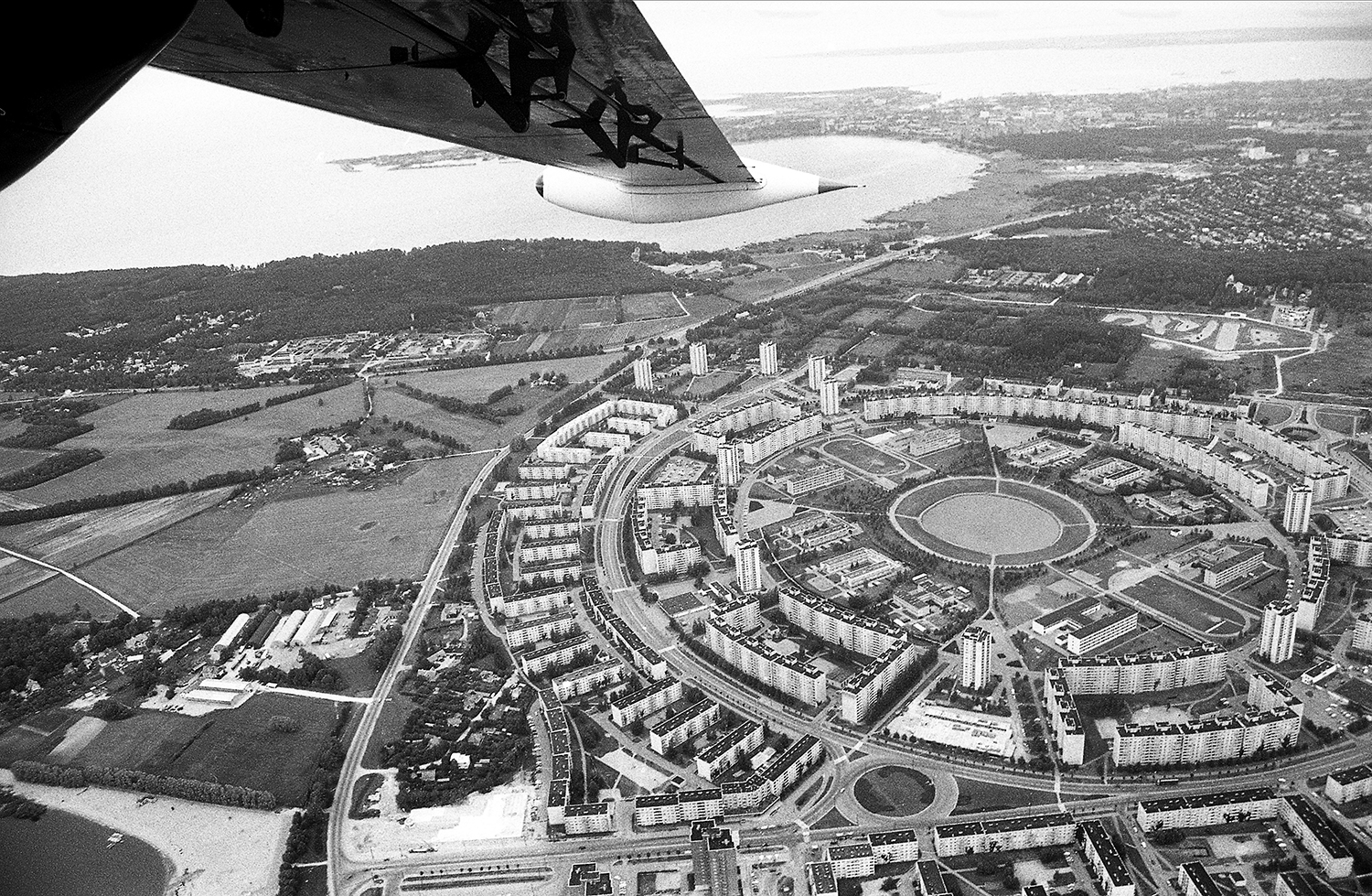 Õismäe lennukilt 92